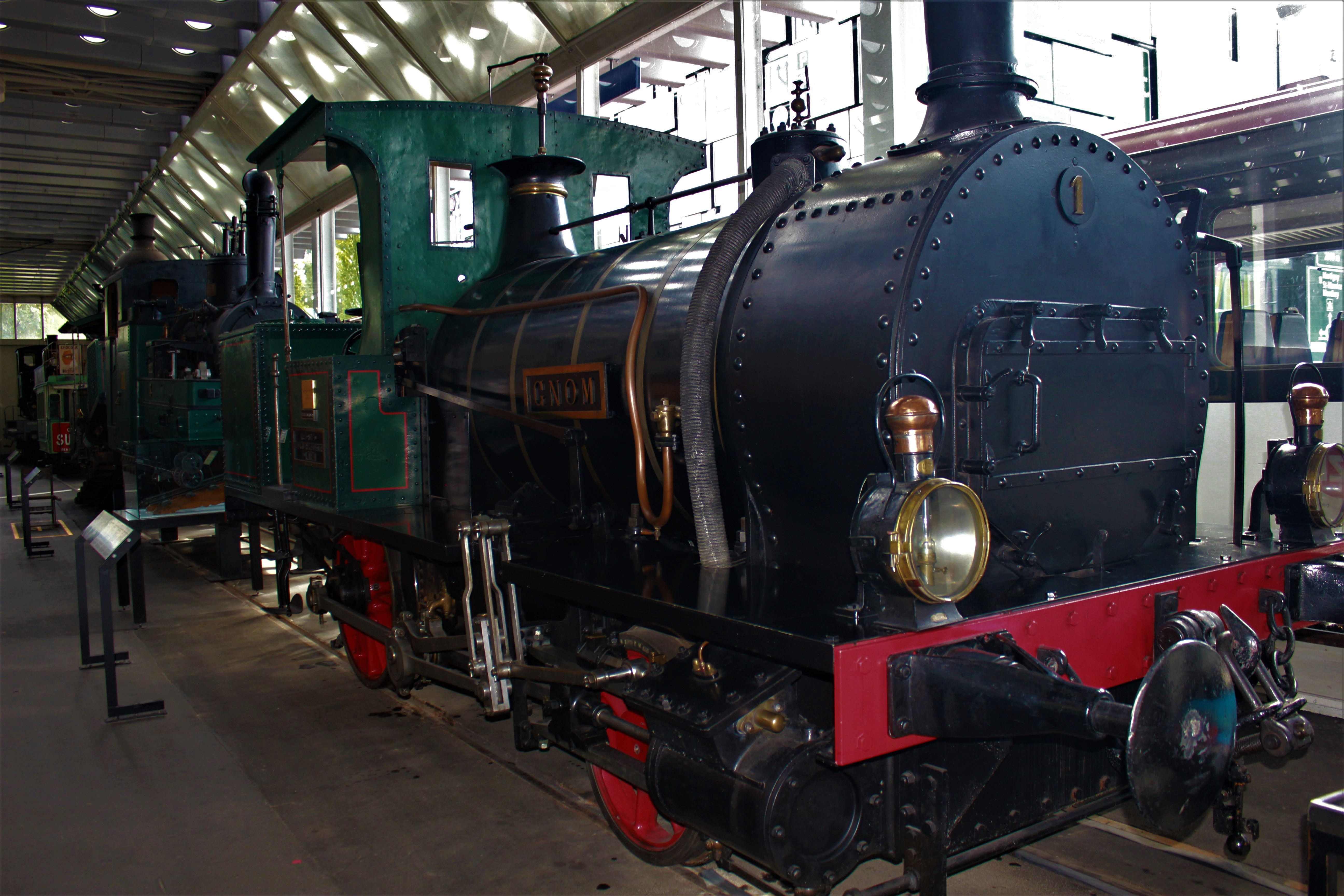 Die Dampflokomotive "Gnom" war ab 1871 im Steinbruch Ostermundigen in Betrieb. Sie hatte neben dem Adhäsionsantrieb auch einen zuschaltbaren Zahnradantrieb für die steile Strecke zwischen Bahnhof und Bergwerk.